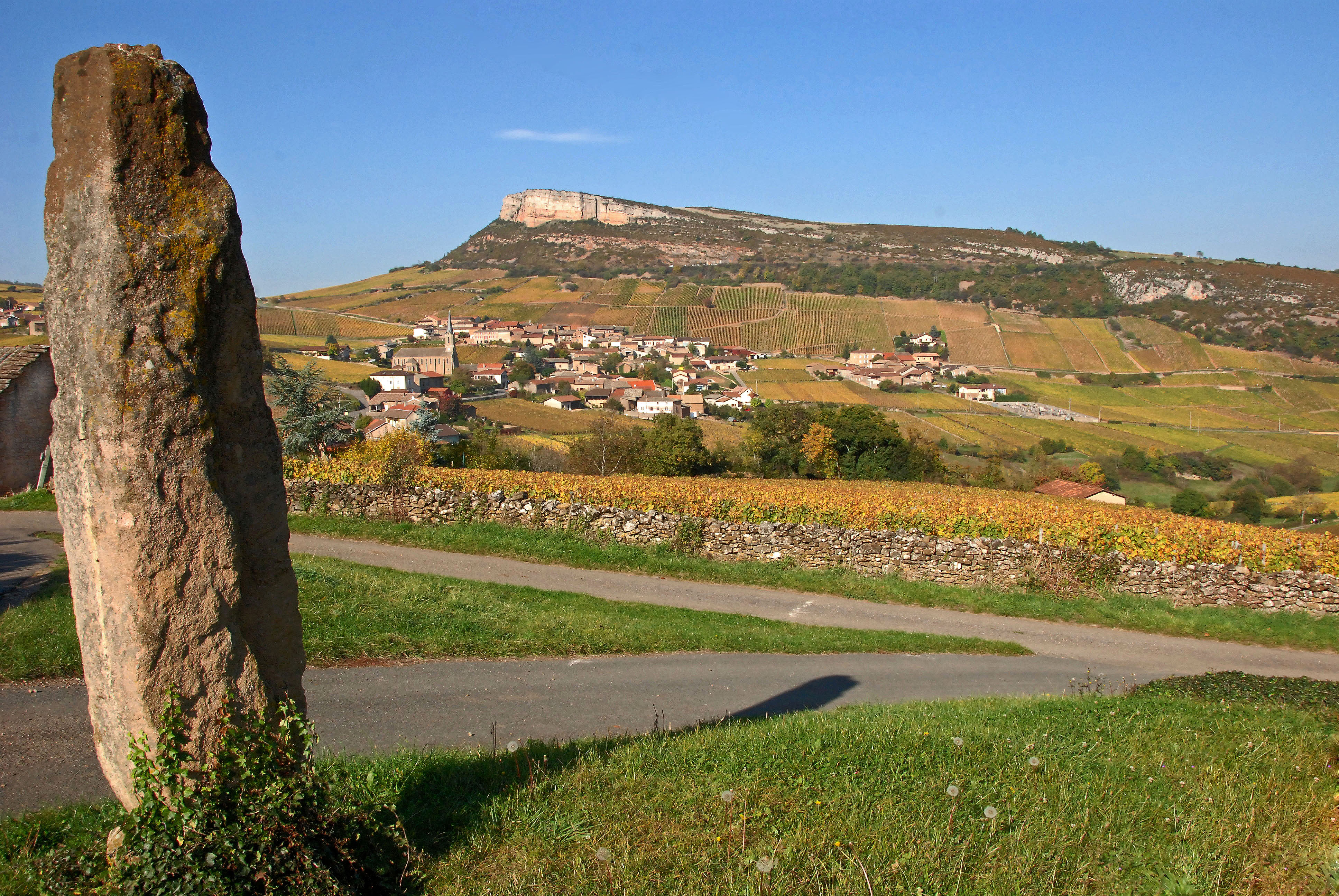 menhir des Chancerons avec en fond la roche de Vergisson